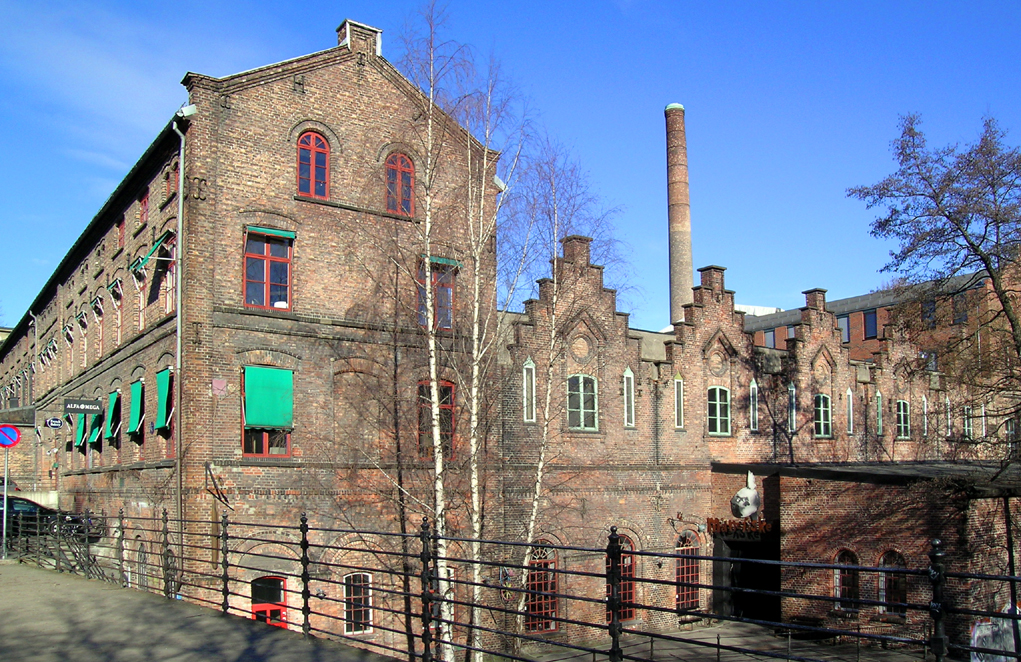 Hjula veveri, Sagveien 23, Oslo. Built 1854.